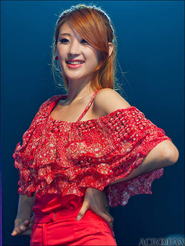 현아, 나인뮤지스 '휘가로' 쇼케이스 현장에서